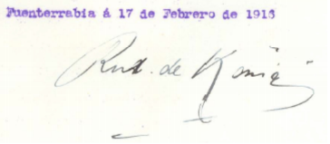 Firma del Barón de Köening que se conserva en el Archivo Municipal de Hondarribia/Fuenterrabía, 17 de febrero de 2016